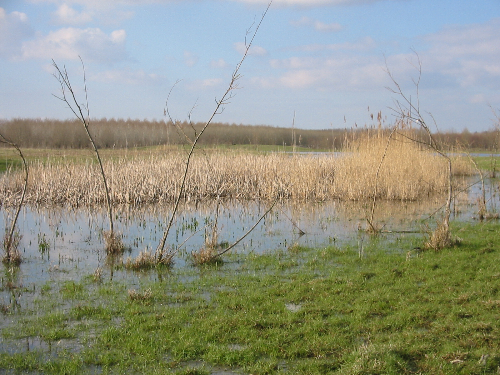 Eigen foto. GerardM 10 mei 2004 12:15 (CEST)